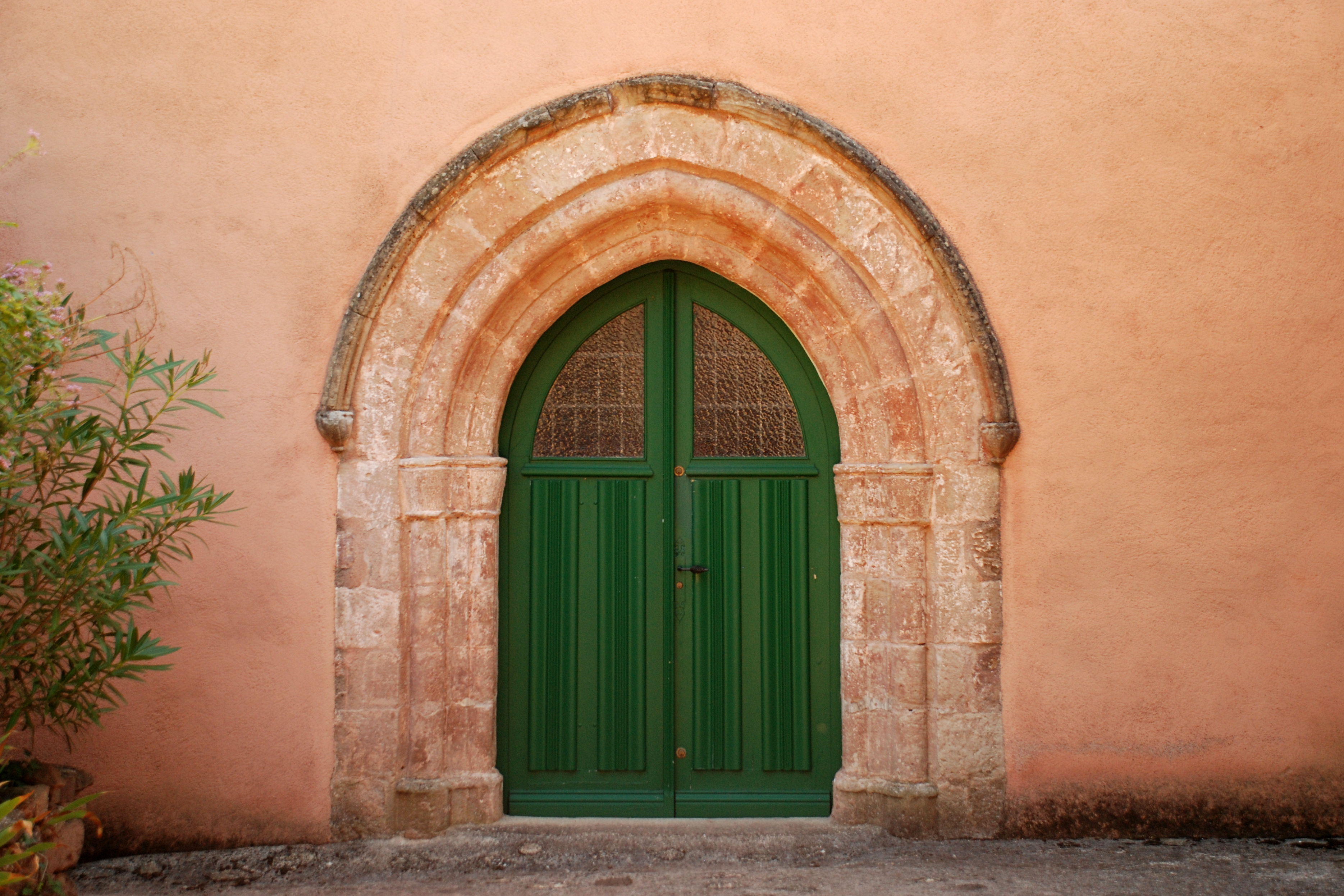 France - Languedoc - Hérault - La Tour-sur-Orb - Église Saint-Cyr et Sainte-Julite de Saint-Xist .